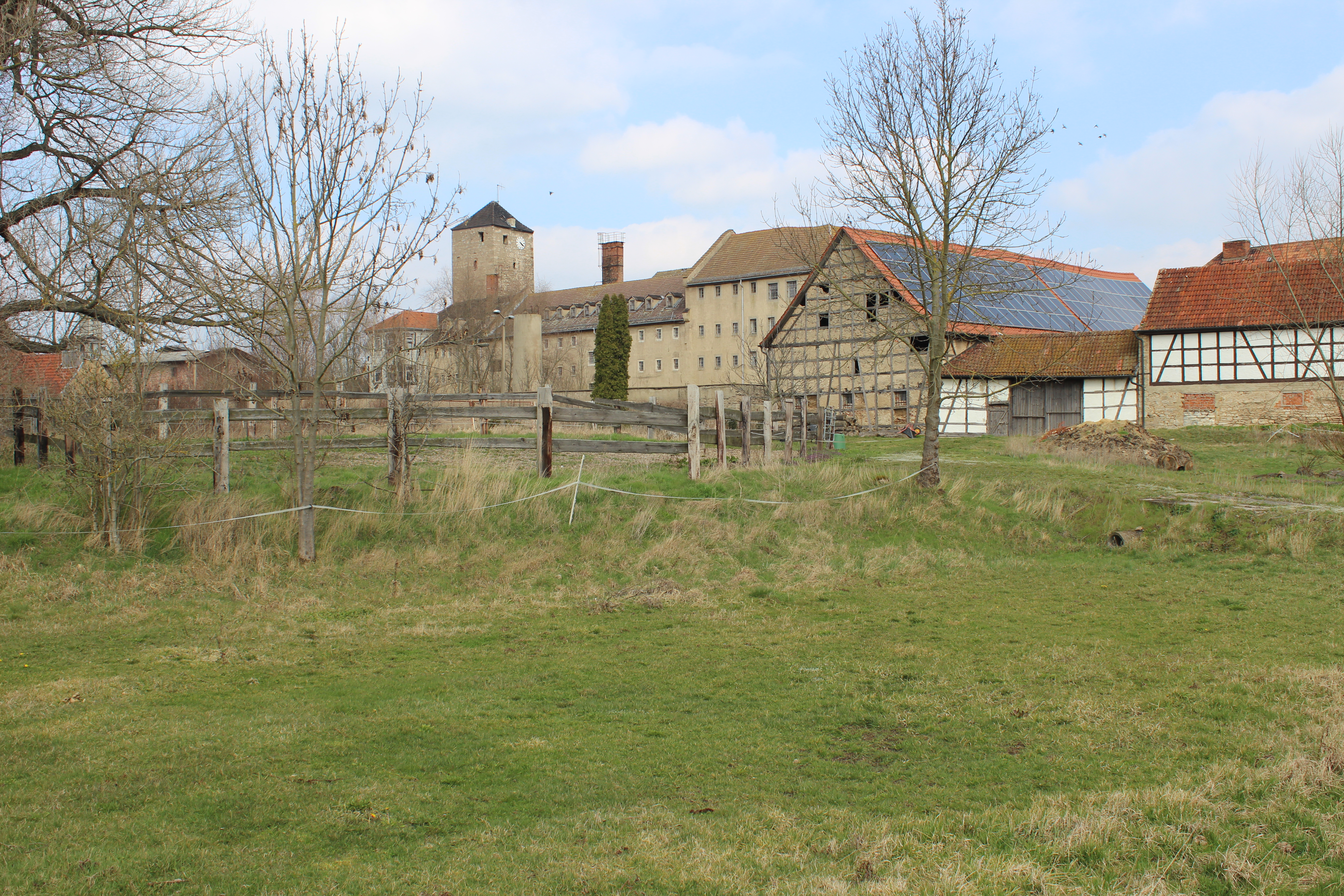 Schloss Tonna in Gräfentonna (auch "Kettenburg" genannt)